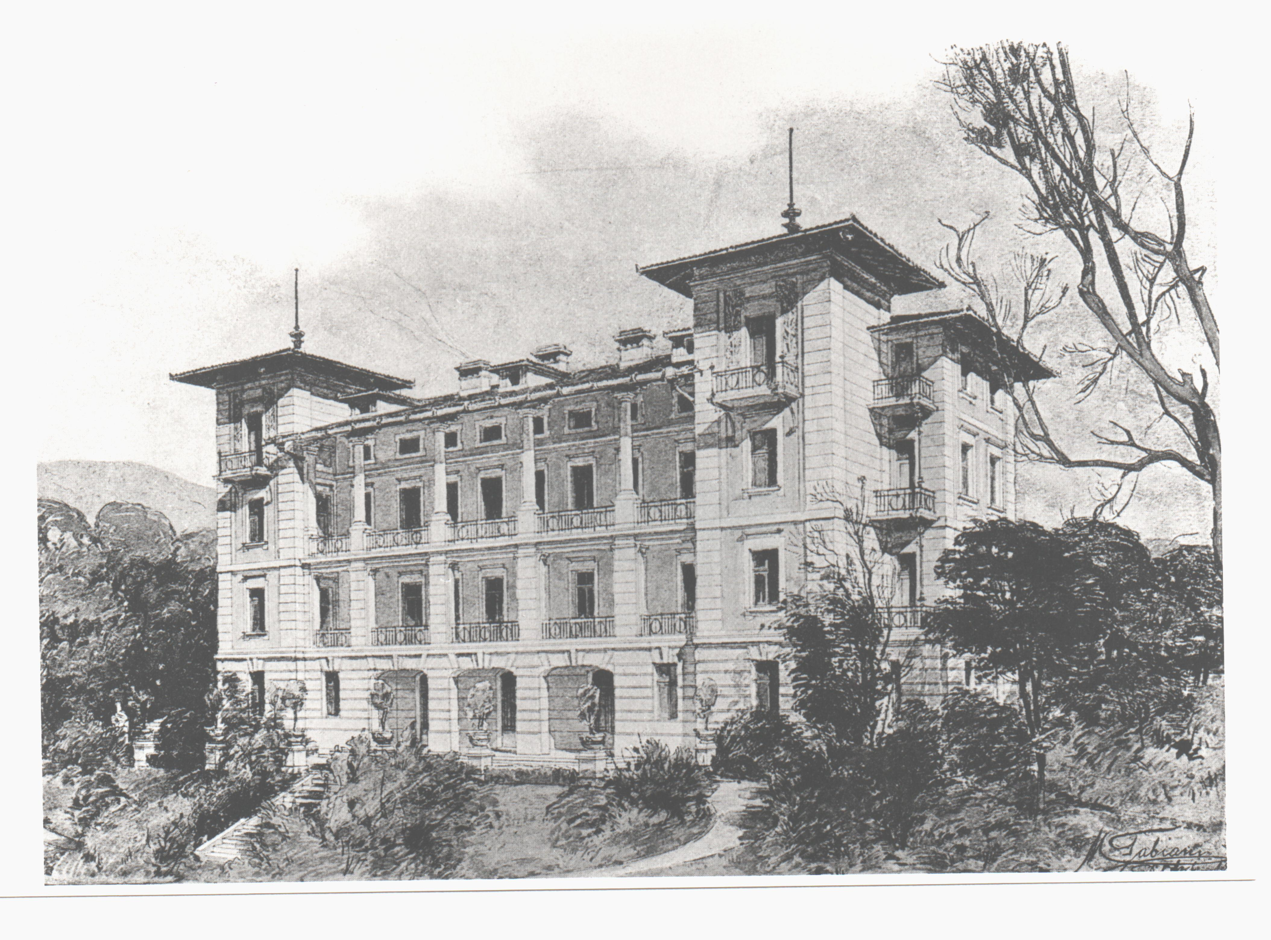 Das Kurhaus in Abbazia, fertiggestellt am 1. Oktober 1898 - Baumeister Ing. Conighi aus Fiume.